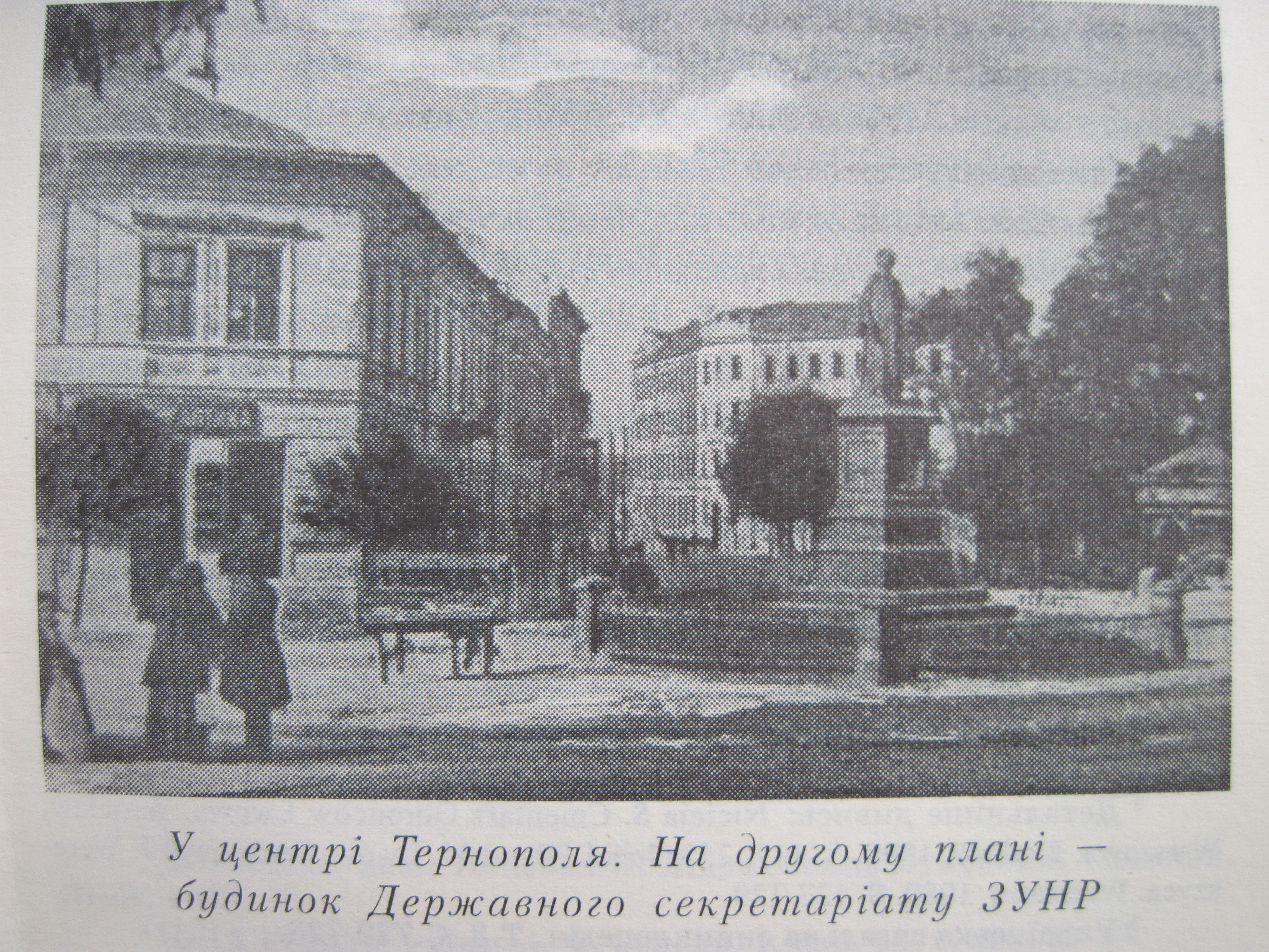 Старий Тернопіль. Майдан біля театру